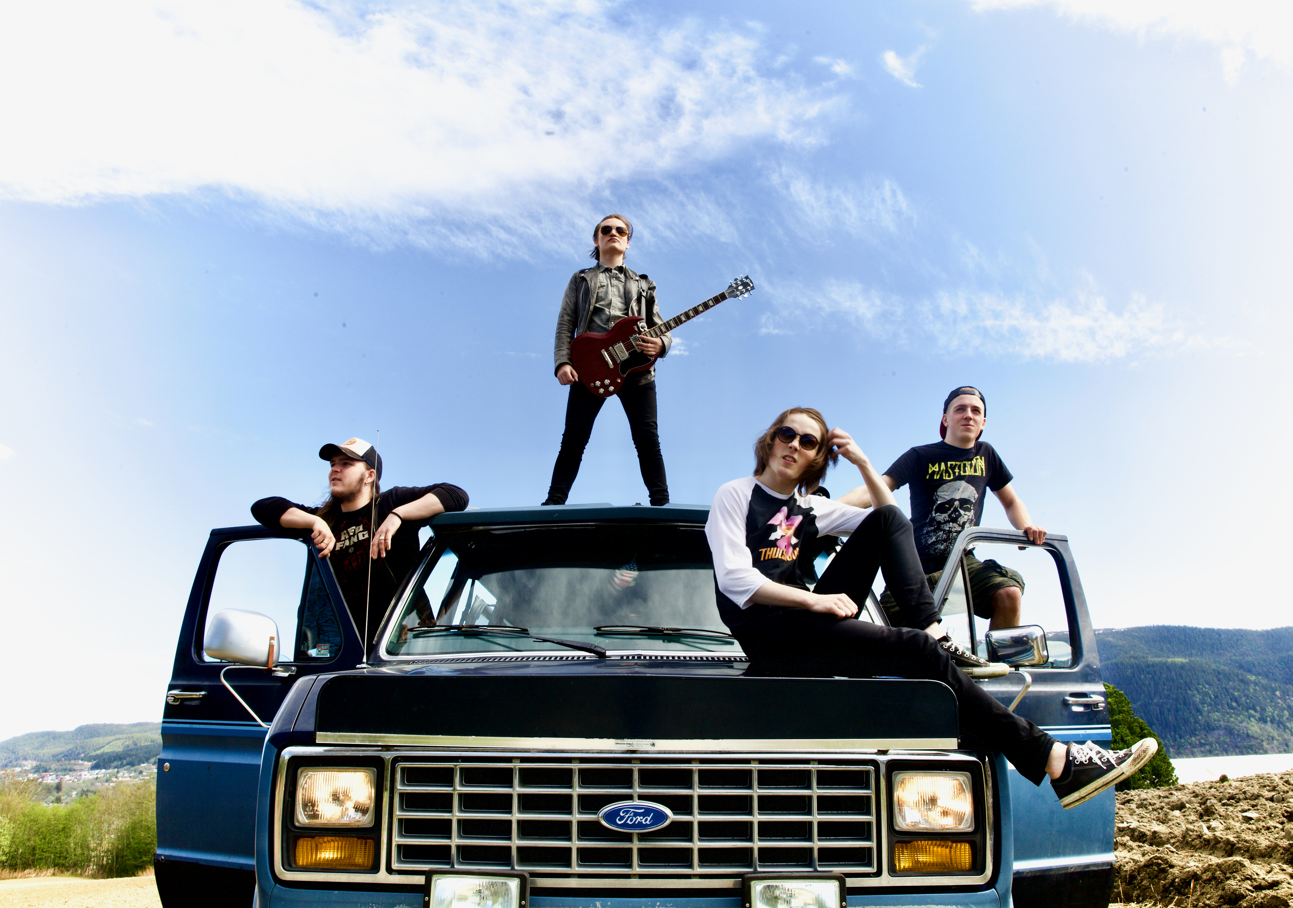 Radiojørn band bilde fra 2018